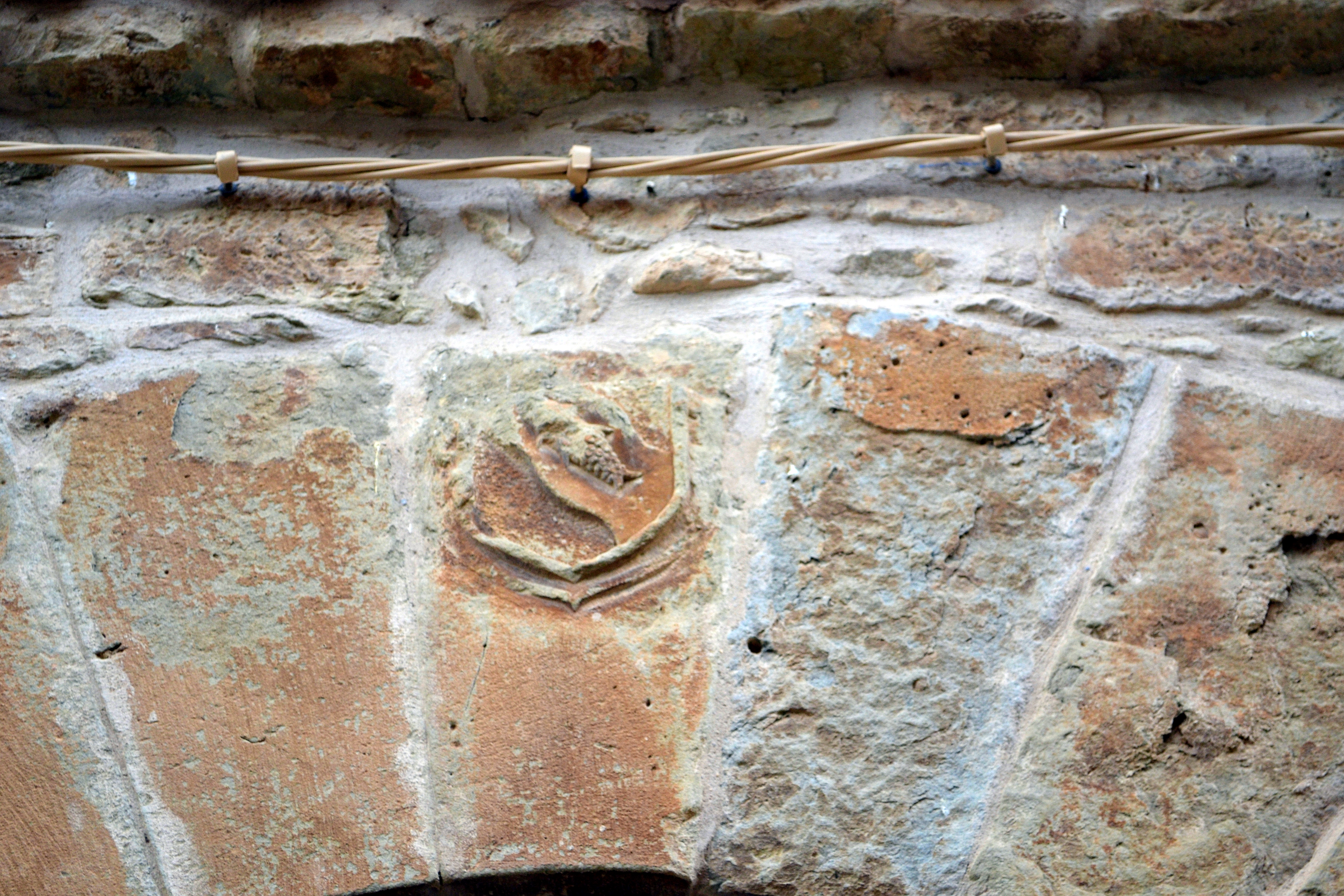 Castell de la Morana (Torrefeta i Florejacs)